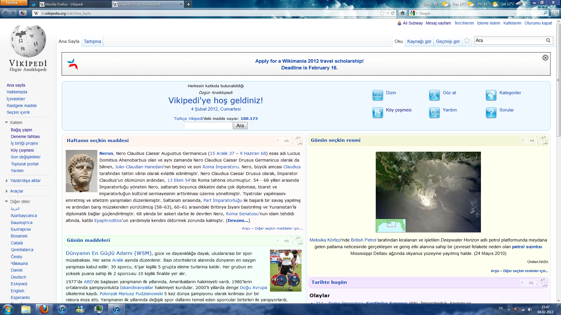 Firefox 10 Vikipedi Sayfasını Gösteriyor (Windows7 üzerinde)